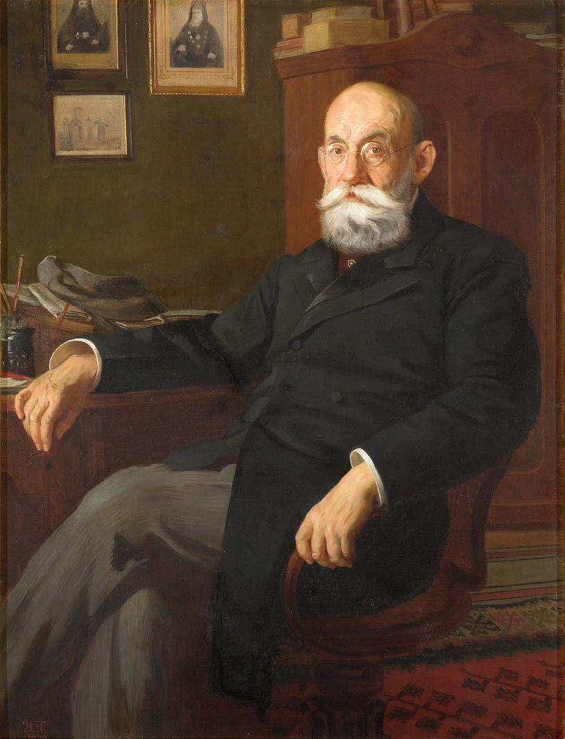 Стојан Новаковић, слика је дело Уроша Предића (1857-1953) Извор